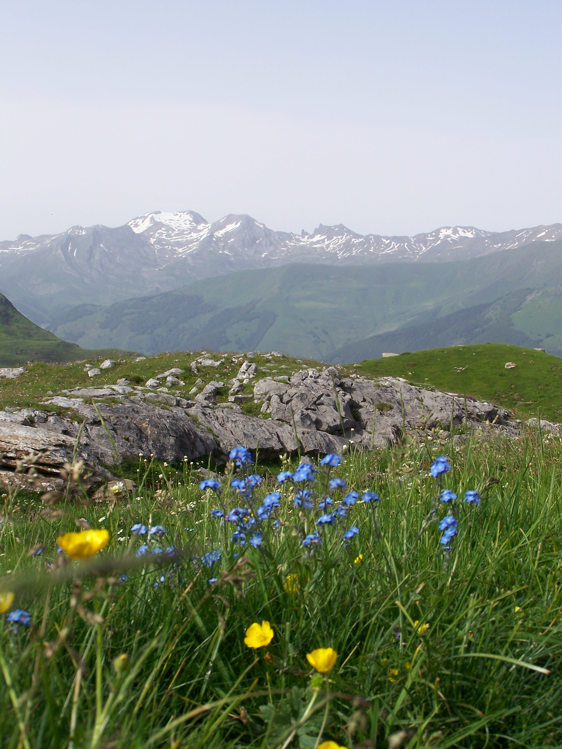 Вид на Ущелье Аспы с берегов озера Астанес (Пиренеи, Испания)